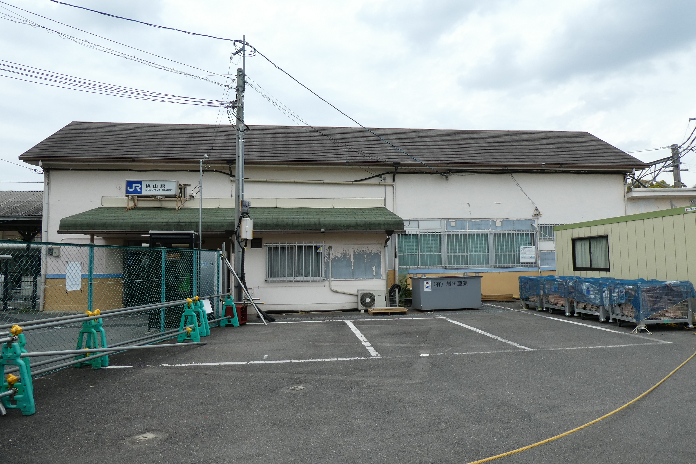 JR奈良線 桃山駅